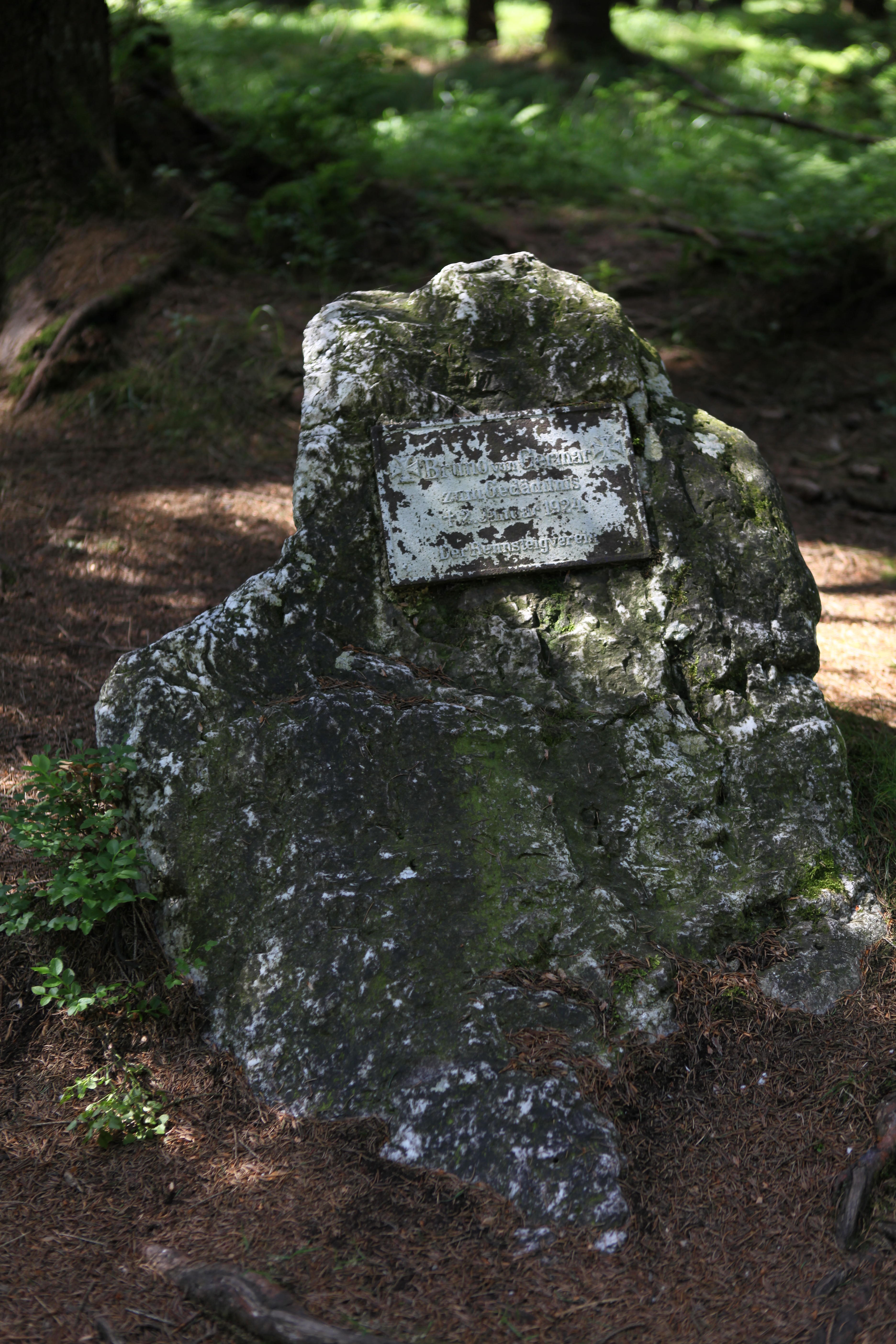 GERMAR GEDENKSTEIN, Rennsteig zw. Masserberg und Friedrichshöhe